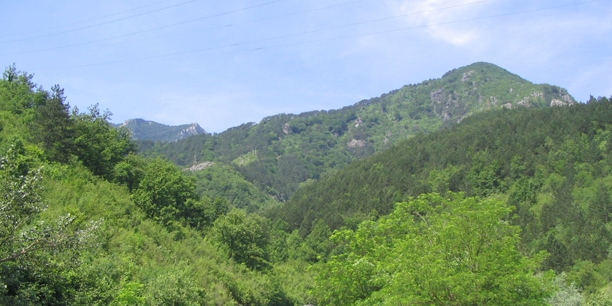 Planina Čvrsnica, pogled sa ceste uz Neretvu